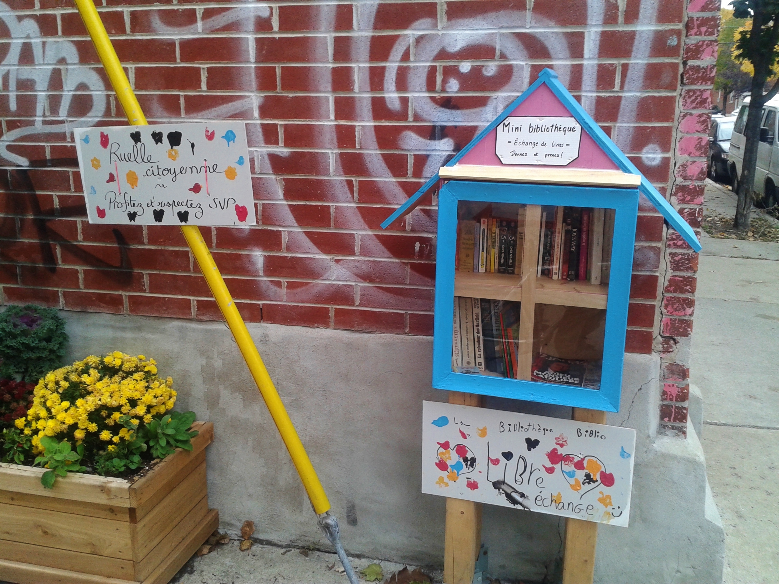 Mini-bibliothèque de la ruelle verte Bonheur d'occasion, à Saint-Henri, Montréal.